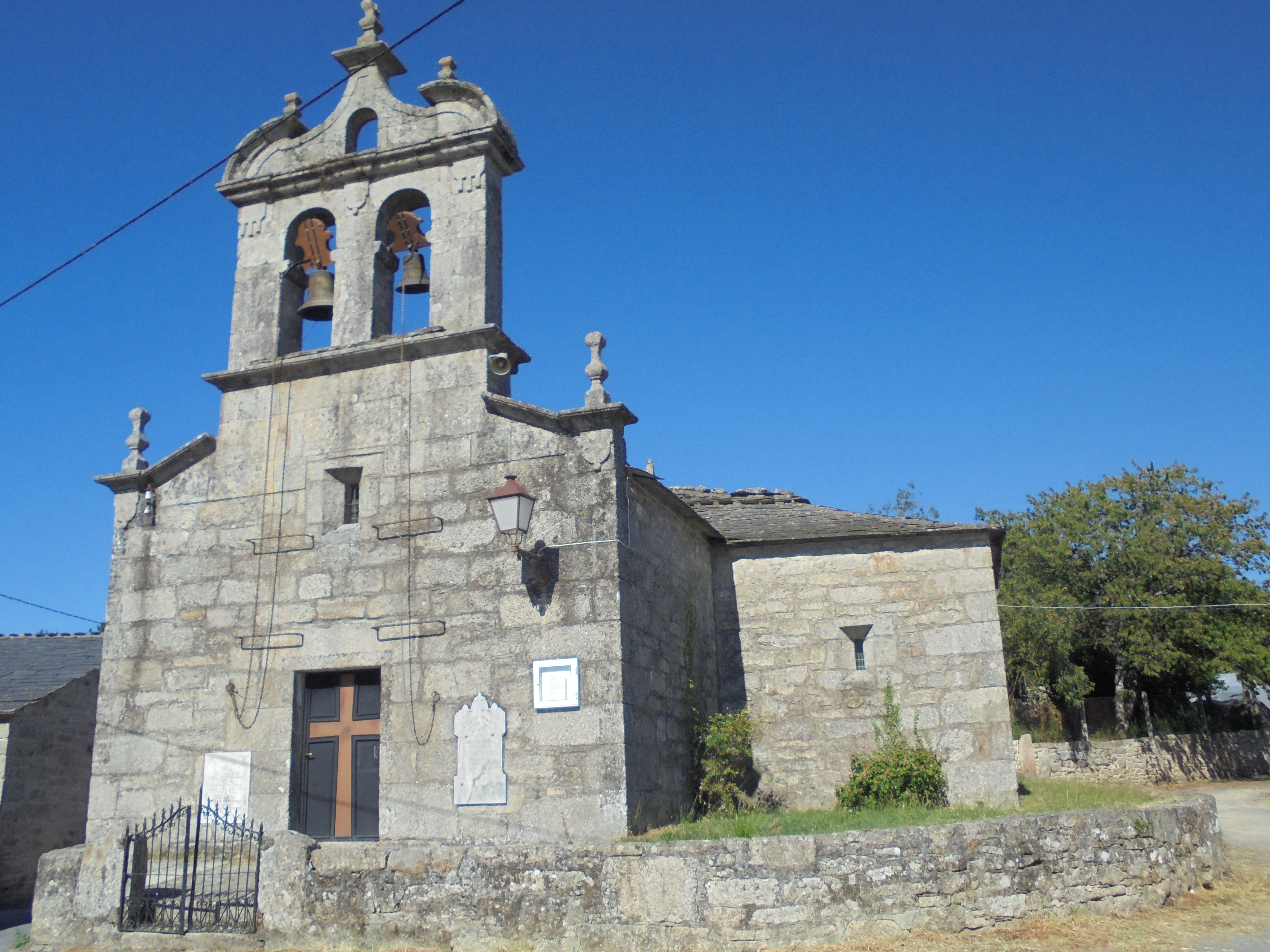 Igrexa parroquial de Bascuas ( Lugo)